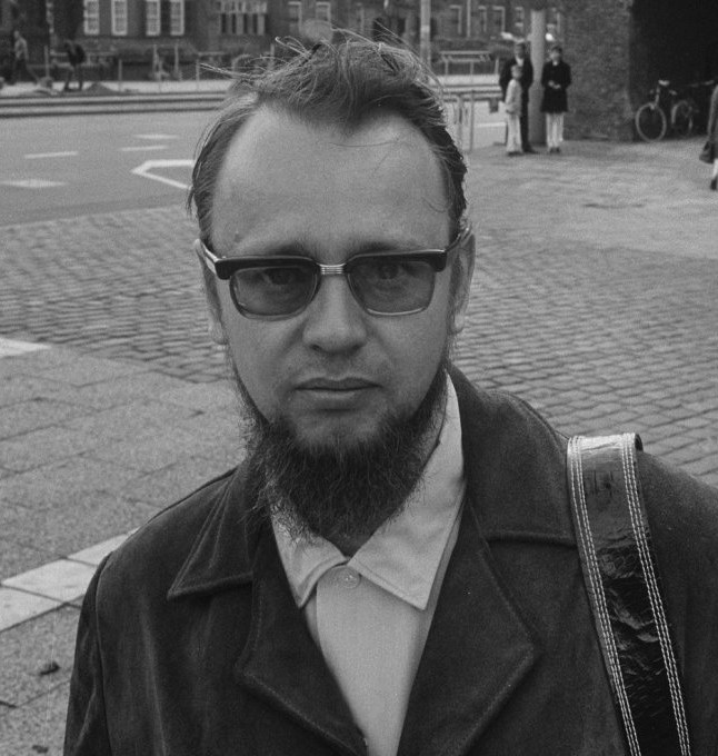 Lars Persson, Zweedse antropoloog die de moord op de Indianen in Brazilië bekend maakte, in Den Haag.